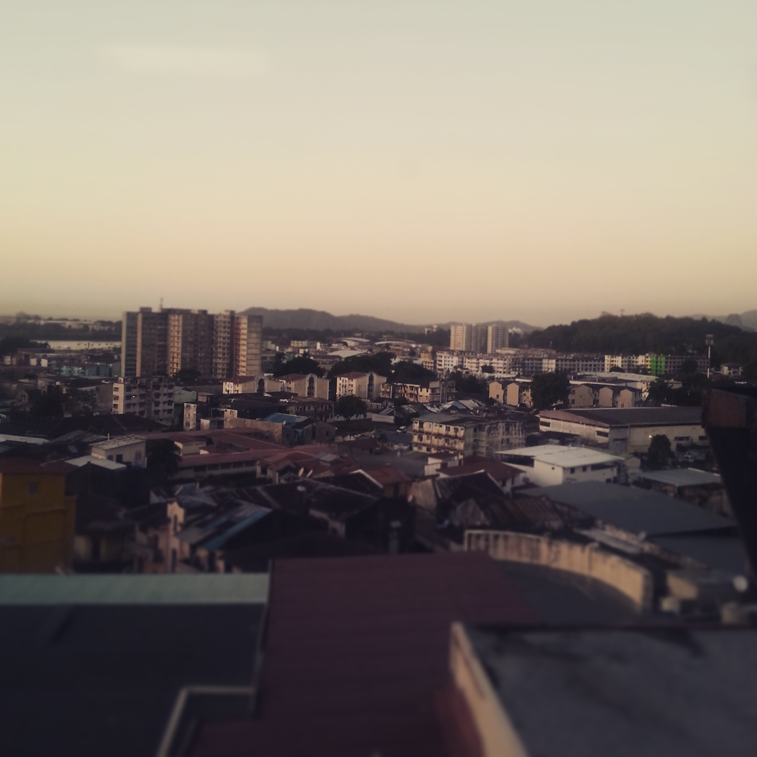 En primer plano el barrio de Santa Ana y en el fondo El Chorrillo, ciudad de Panamá, Panamá.